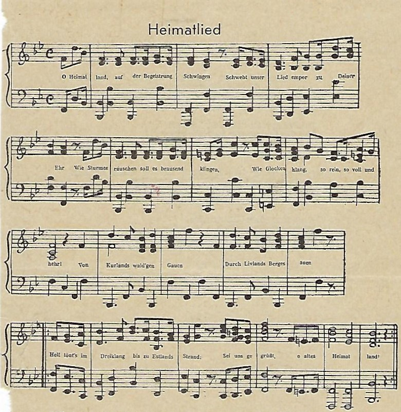 Notierung des Liedes „Heimatland“ der Deutsch-Balten